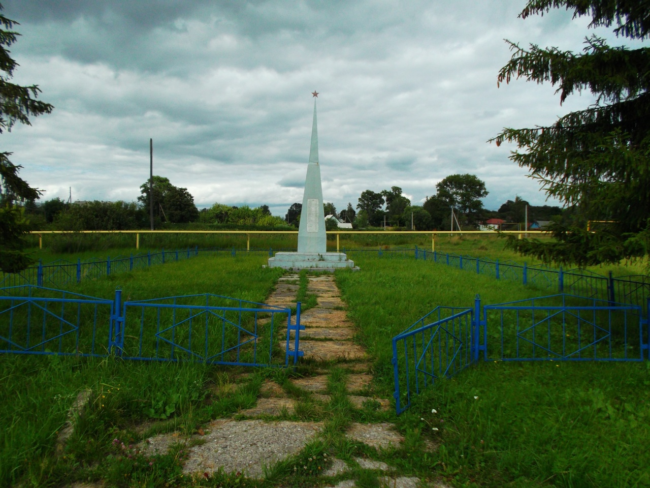 Памятник участникам Великой Отечественной войны Село Дуденево, Богородский район Нижегородской области.